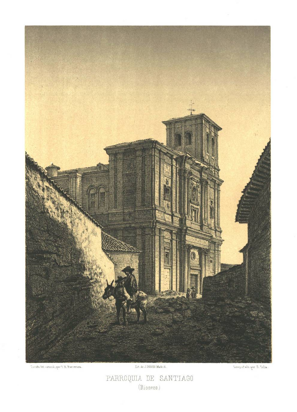 Iglesia de Santiago Apóstol en Medina de Rioseco